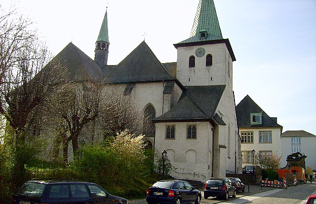 Propsteikirche Arnsberg